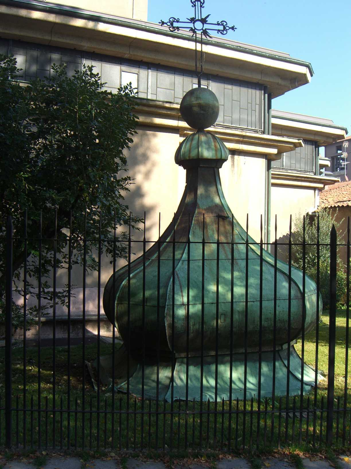 MB Monza chiesa di San Biagio - copertura in rame del campanile della chiesa settecentesca demolita